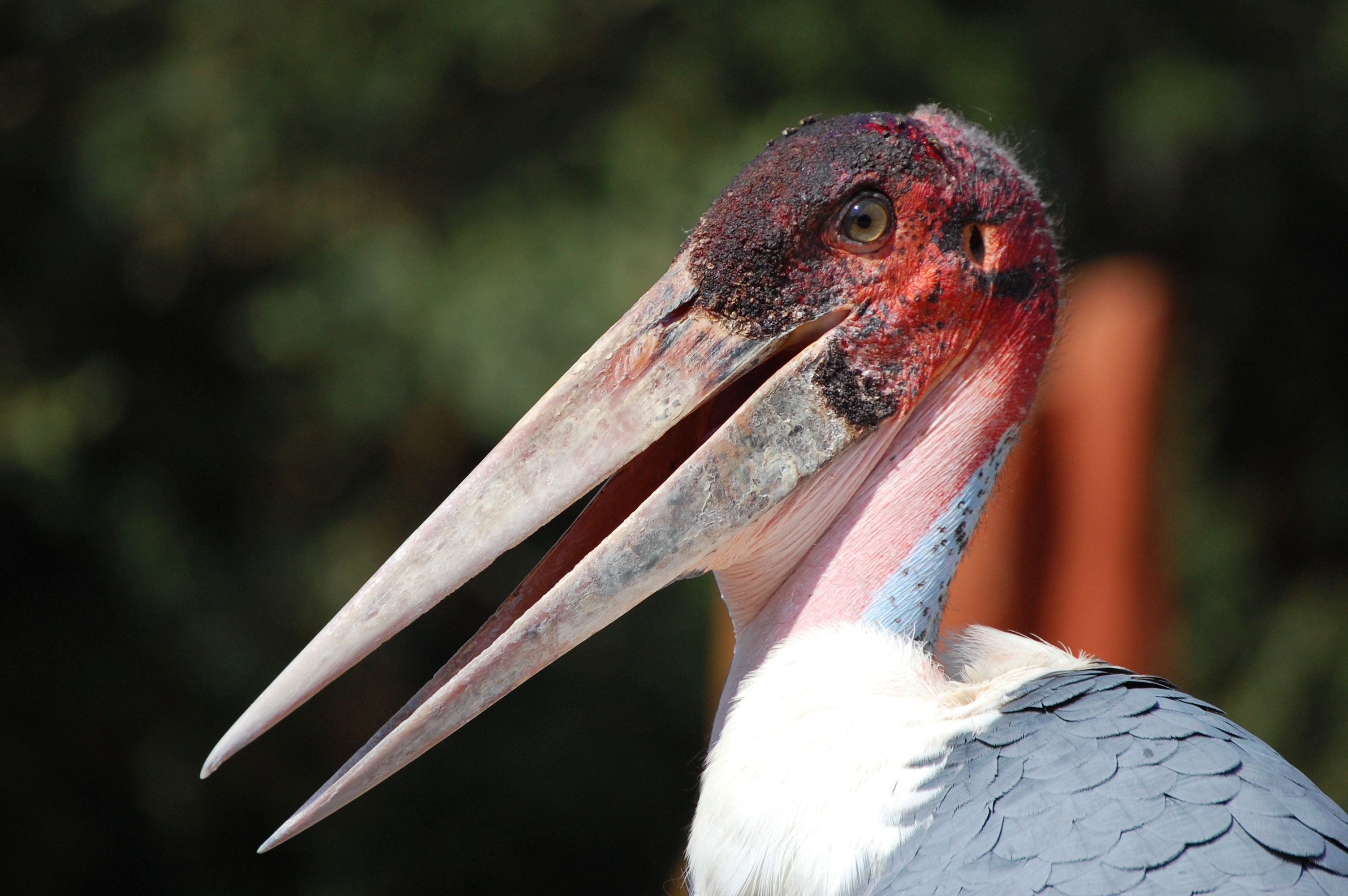 Leptoptilos_crumeniferus